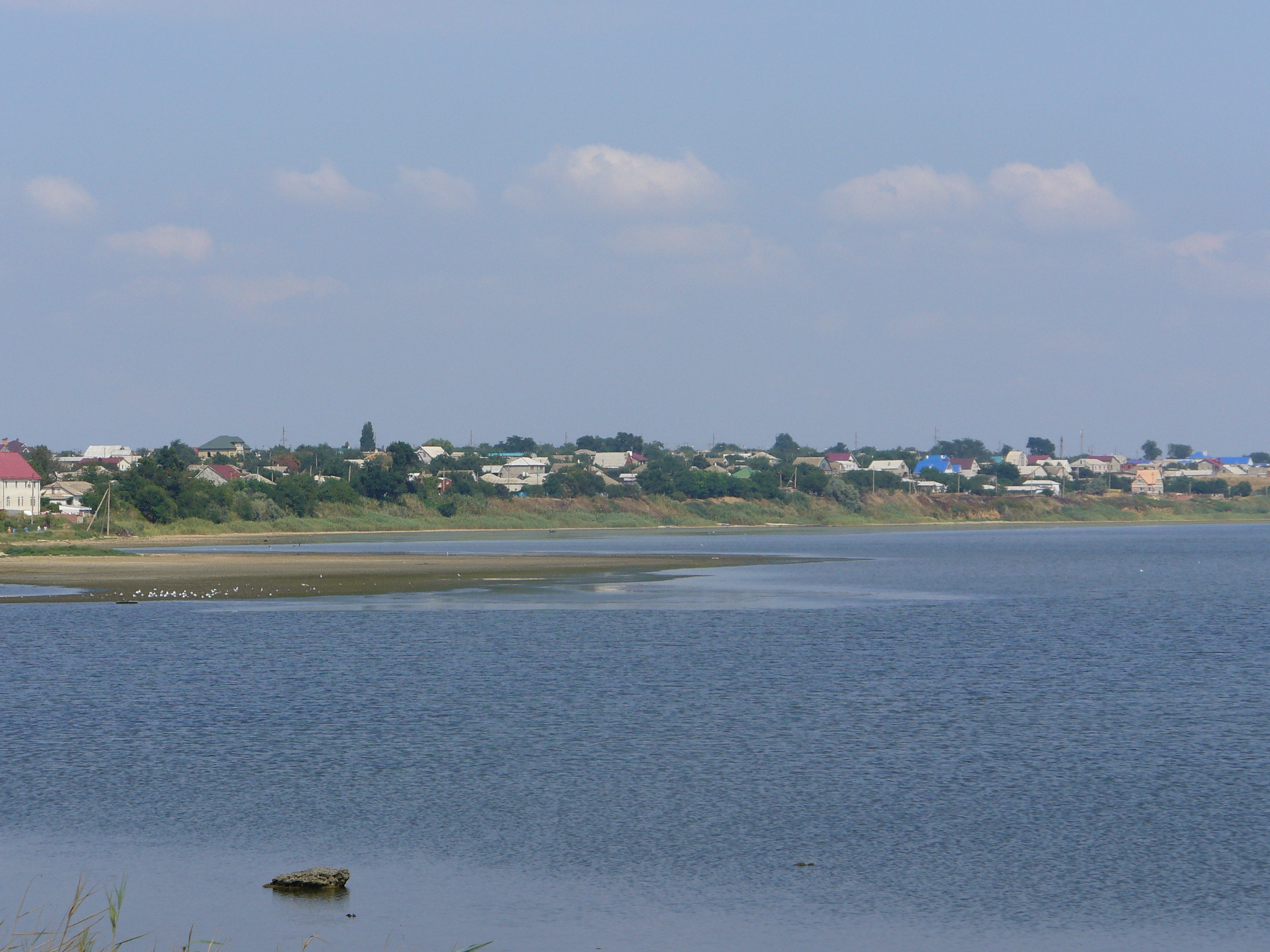 вид на Благовещенскую